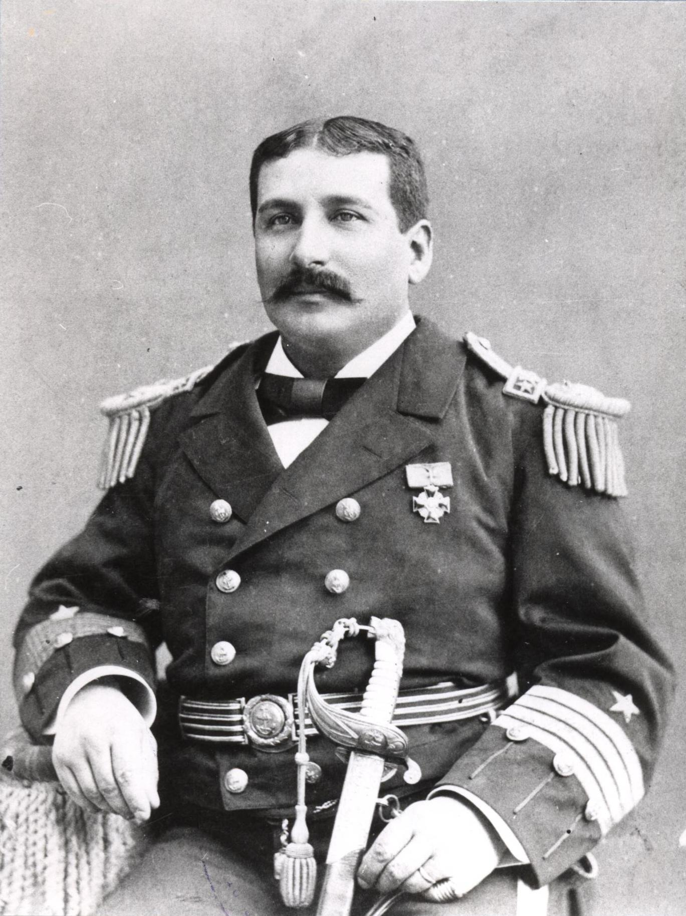 Juan José Latorre Benavente (Santiago; 24 de marzo de 1846 - 9 de julio de 1912) Marino chileno, uno de los principales actores de la Guerra del Pacífico, vencedor del Combate Naval de Angamos.